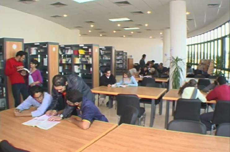 Library